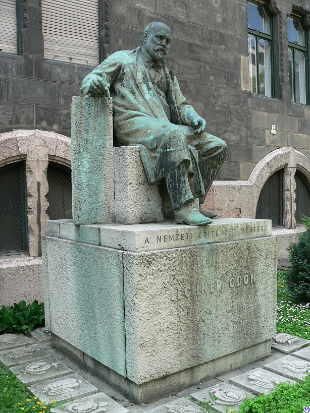 Denkmal für Ödön Lechner am Kunstgewerbemuseum in Budapest Sculptors: Béla Farkas and Ferenc Kende (1936)